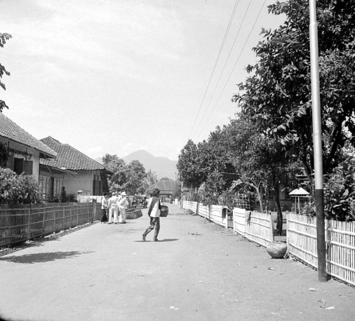 Repronegatief. Straatgezicht, Madjalaja bij Bandoeng